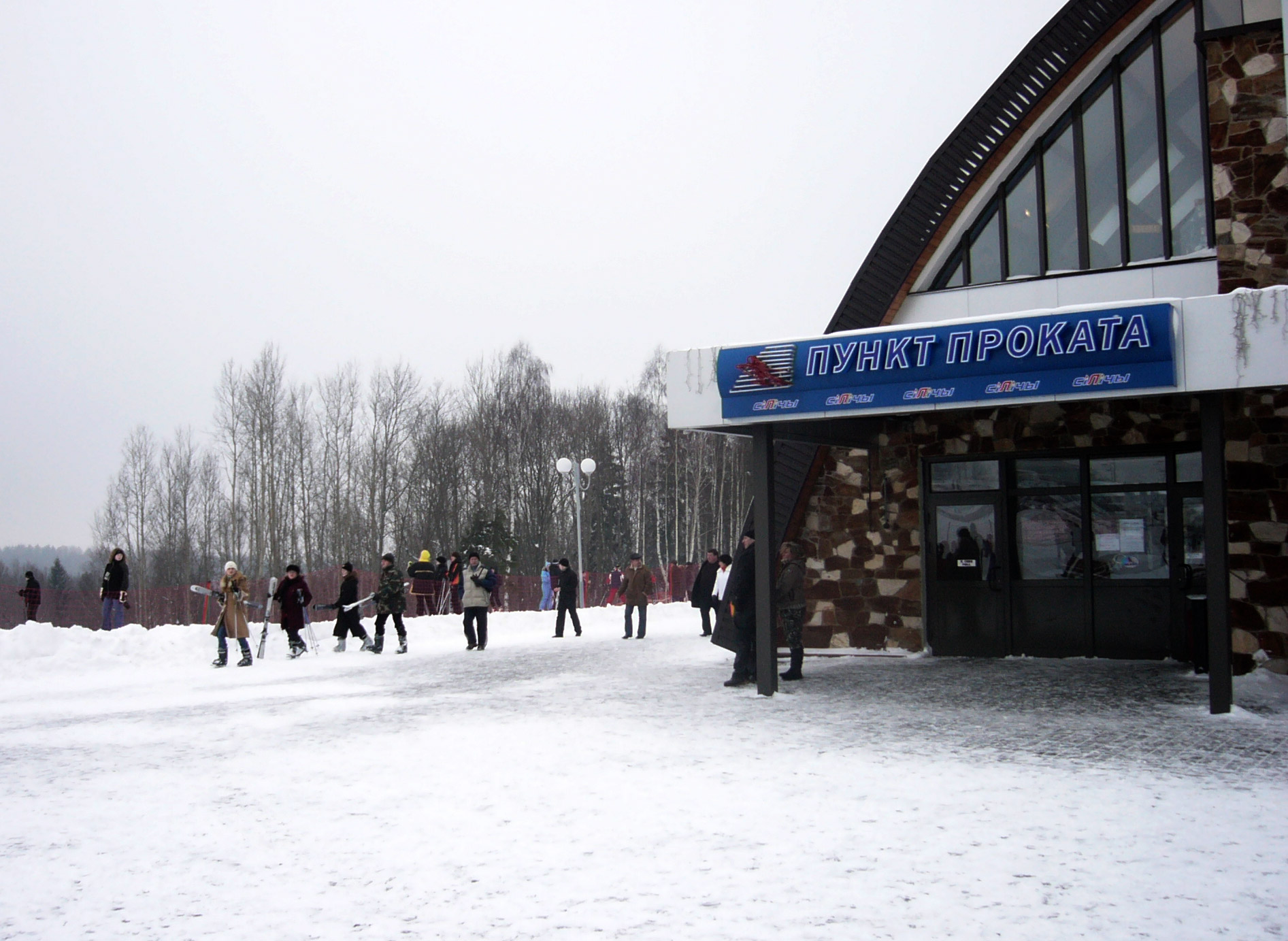 "Silichy" ski resirt in Belarus